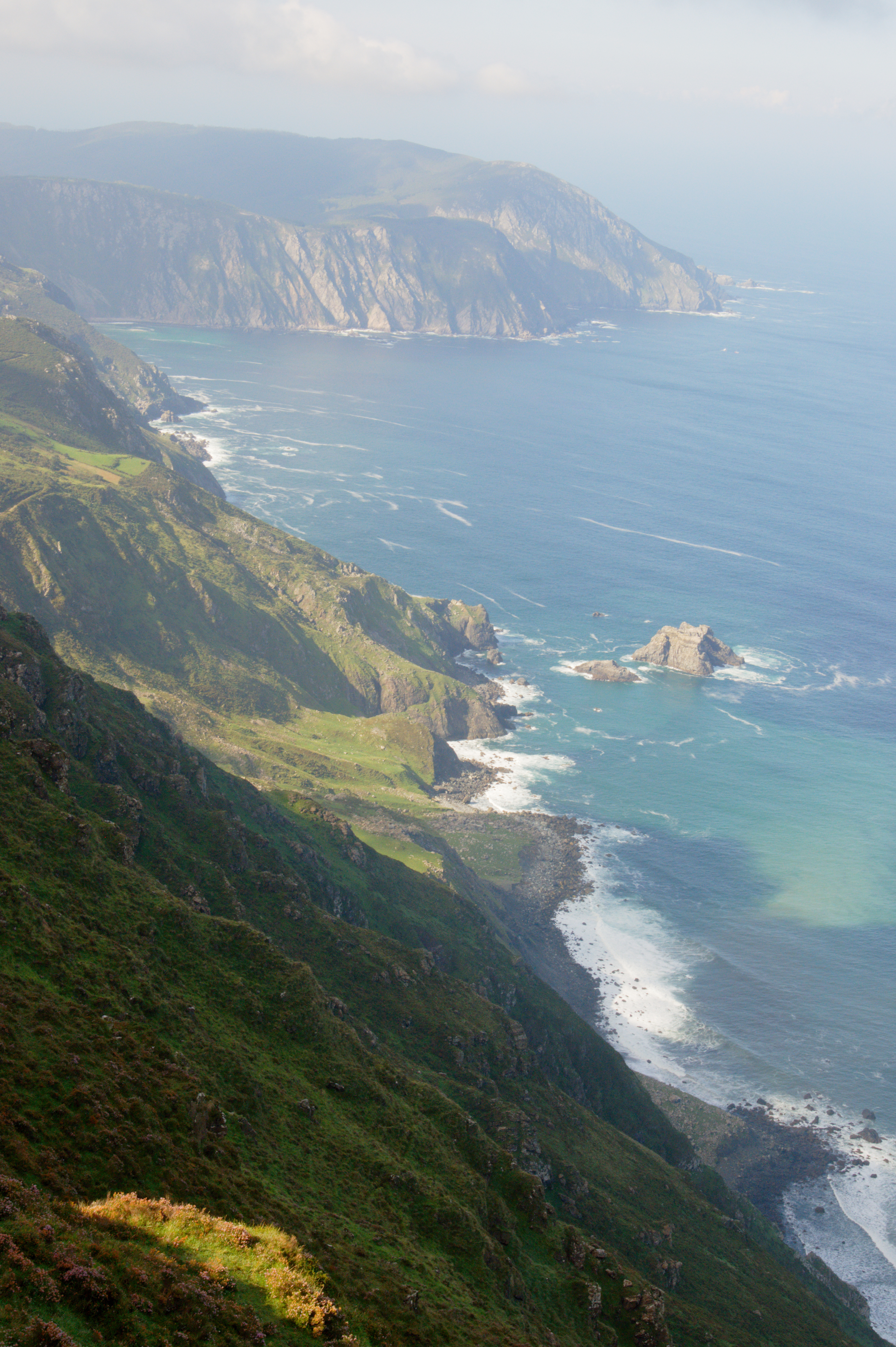 Küstenlinie der Serra da Capelada, Blick von der Garita de Herbeira